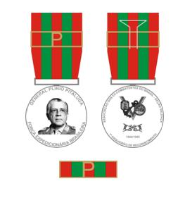 Medalha General Plínio Pitaluga, instituida pela Associação dos Ex-Combatentes do Brasil - Seção Valença